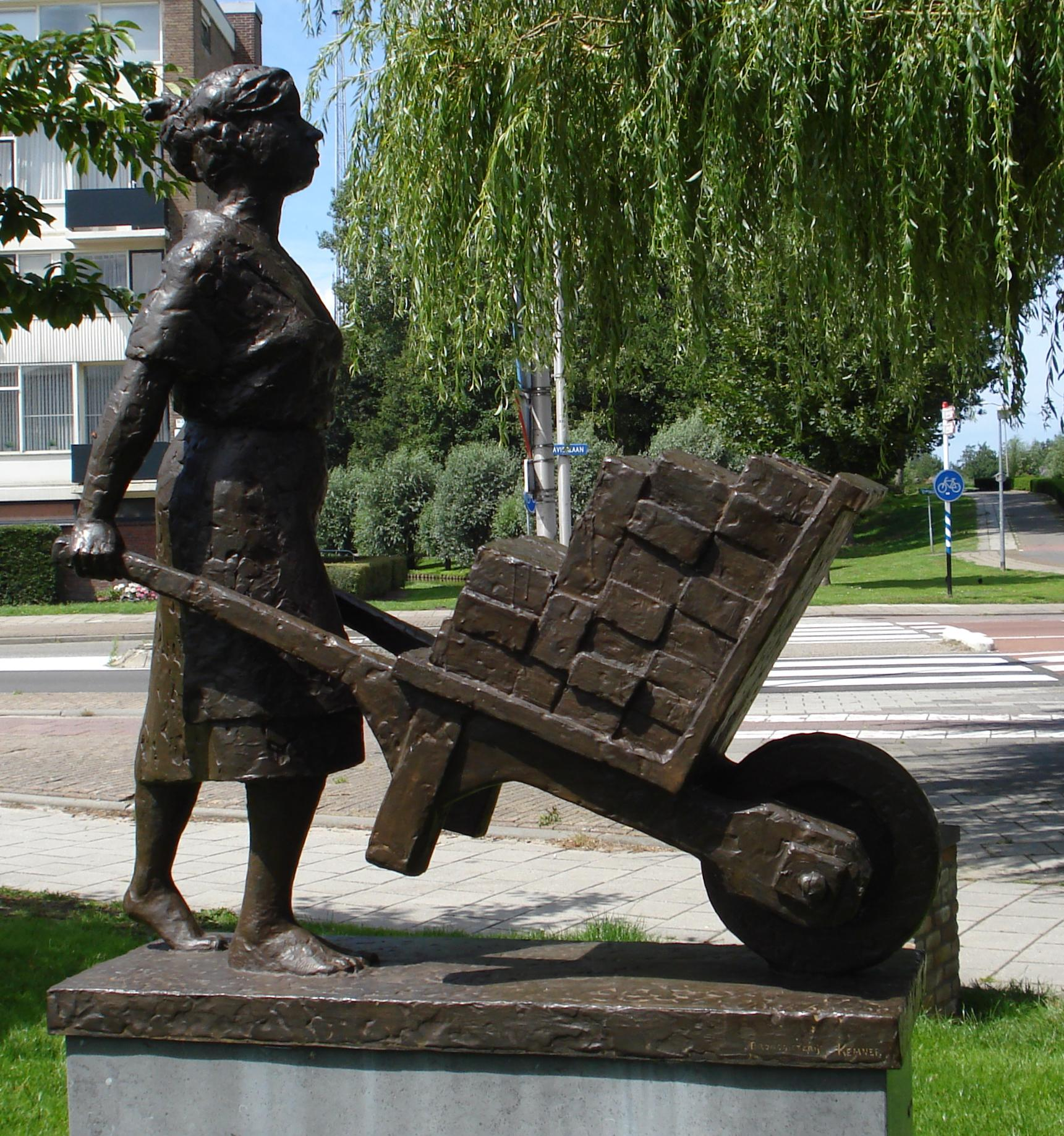 Zuidplas, Nieuwerkerk a/d IJssel, Batavierlaan, vlakbij NS-station. Kunstwerk "De stenenkruister" van Loek Bos, 2009. Zuidplas/The Netherlands. FOP.